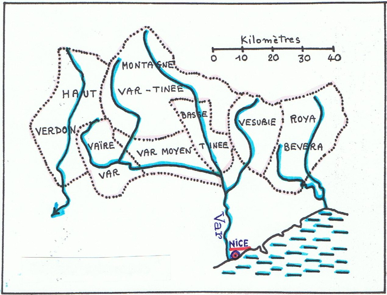 Les régions humaines des Alpes maritimes d'après Raoul Blanchard